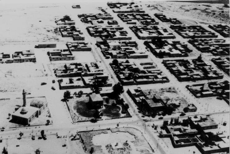 באר שבע- מראה מן האוויר